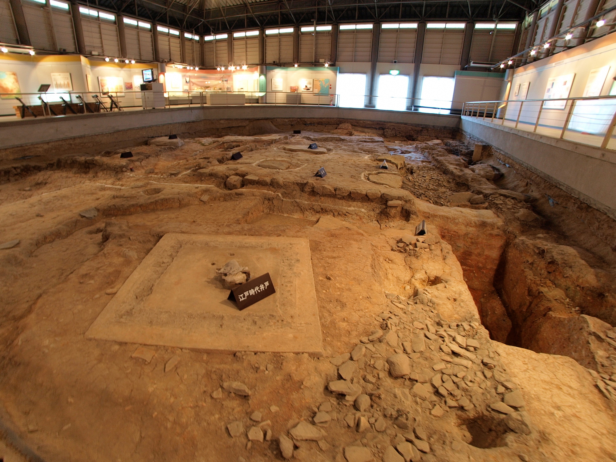 福岡市中央区、鴻臚館跡展示館内にある鴻臚館遺構。